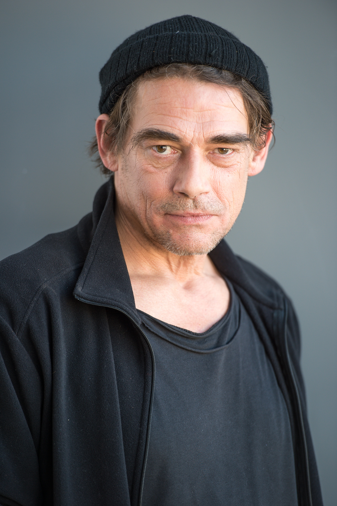 BR,Bayerischer Rundfunk,Bayerisches Fernsehen,Filmbrunch 2017,Martin Feifel